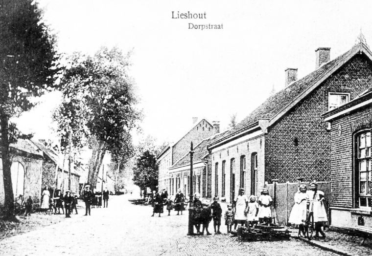 De Dorpsstraat te Lieshout, begin 20ste eeuw